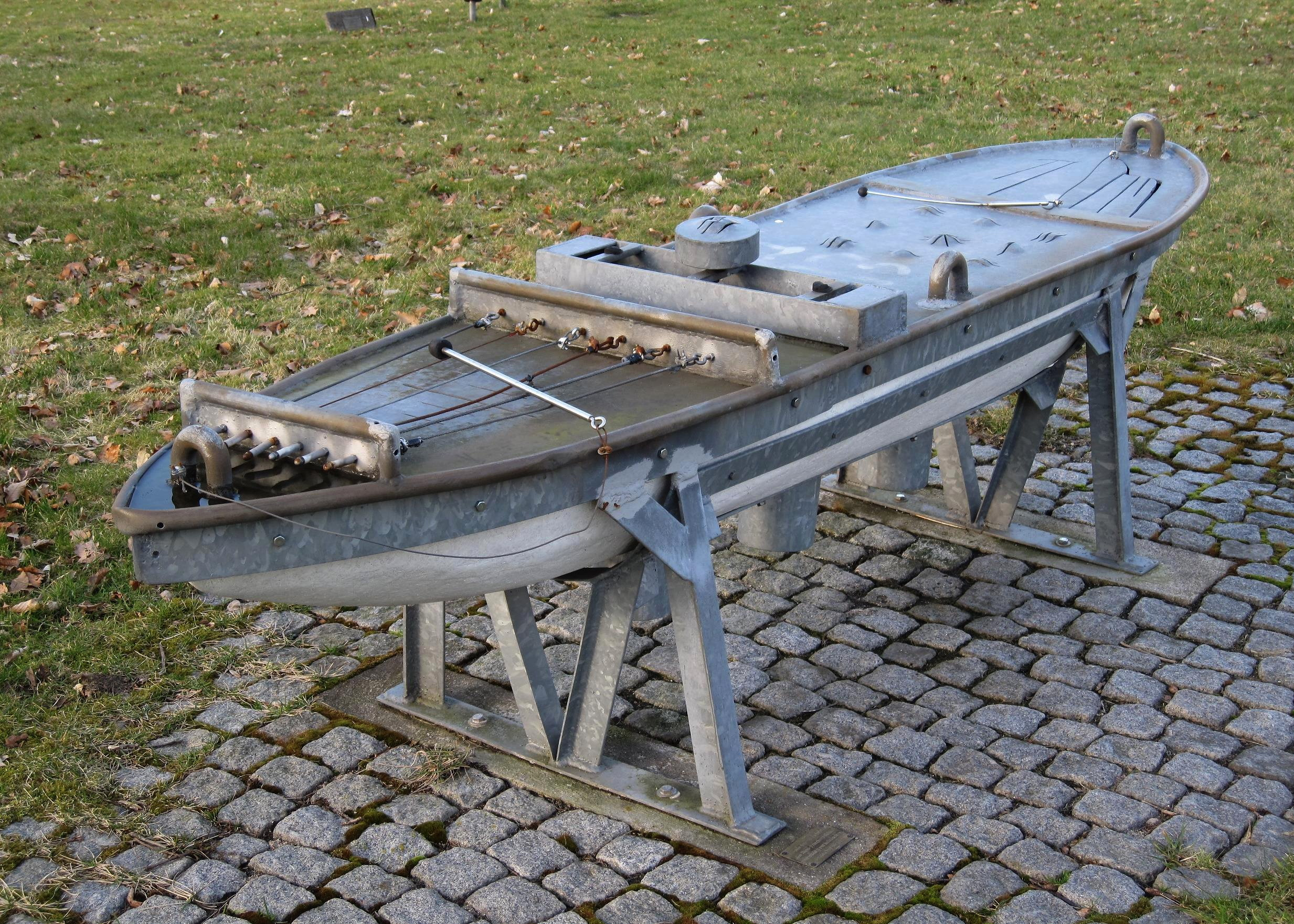 Klang-Skulptur Boot aus dem Jahr 1997 (mit Metall überzogener Holzkörper) am Weg der Be-Sinnlichkeit auf dem Gelände der Hans-Prinzhorn-Klinik in Hemer-Frönsberg. Künstler: Gordon Brown, Bildhauer, Hamm.